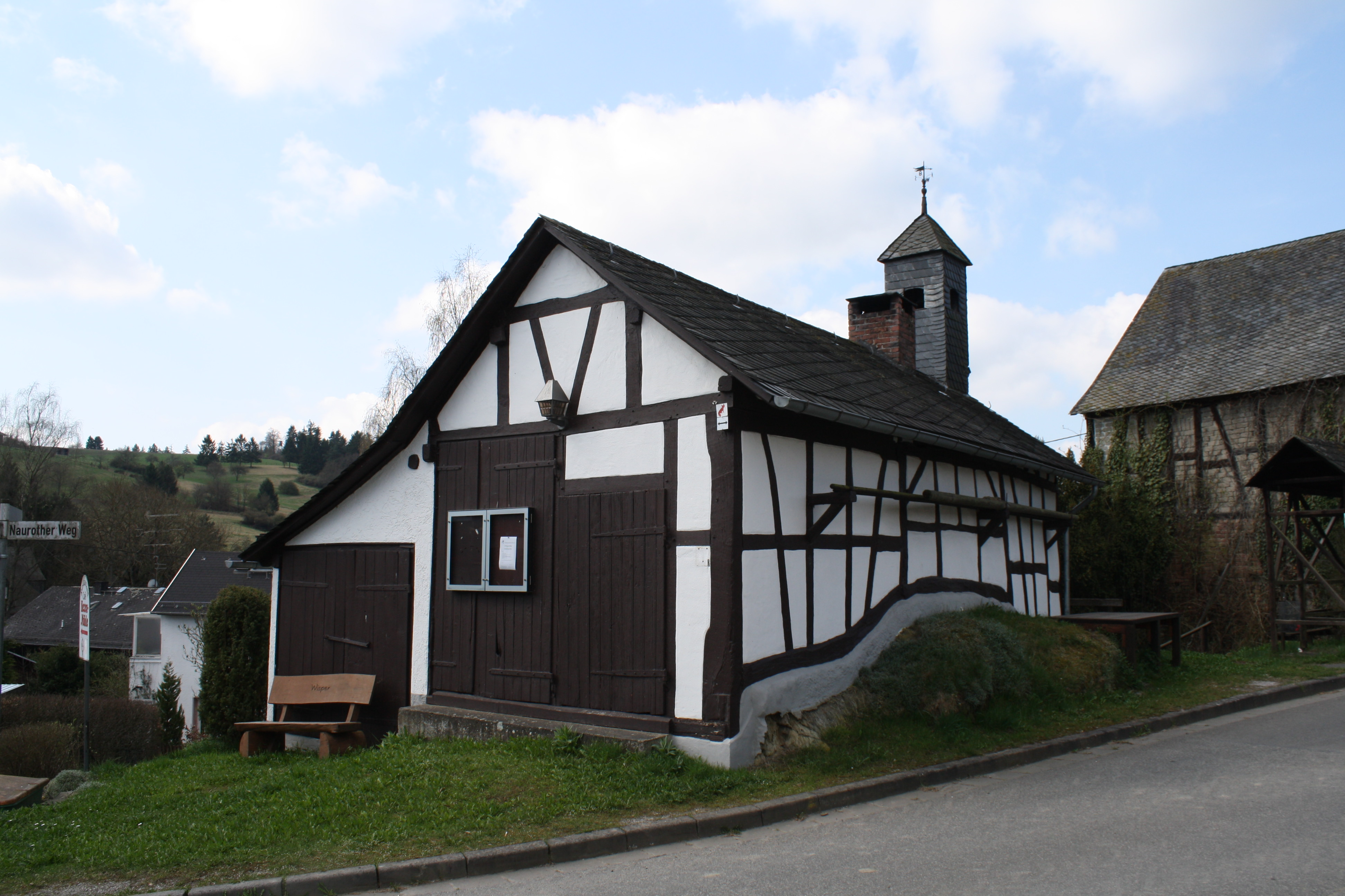 Historisches Backhaus in Wisper einem Ortsteil von Heidenrod